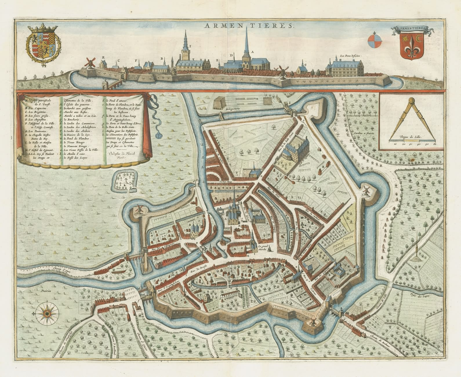 Armentieres